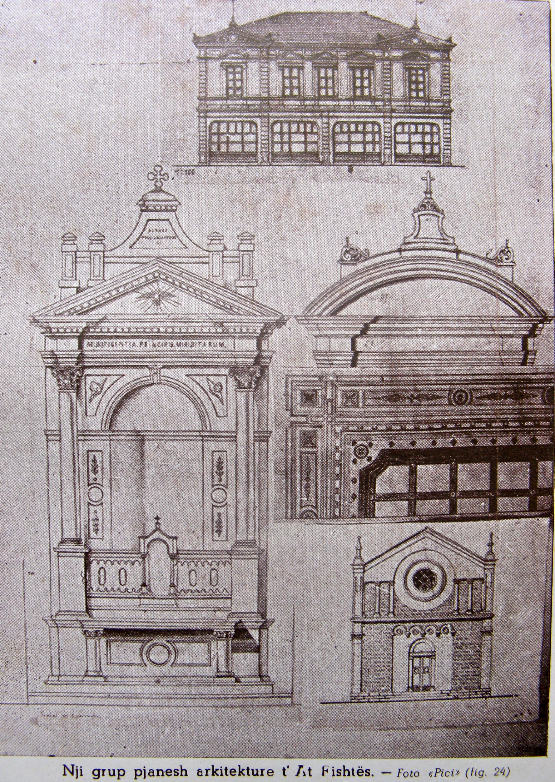 In questa foto vengono rappresentati alcuni disegni architettonici fatti da padre Gjergj Fishta.